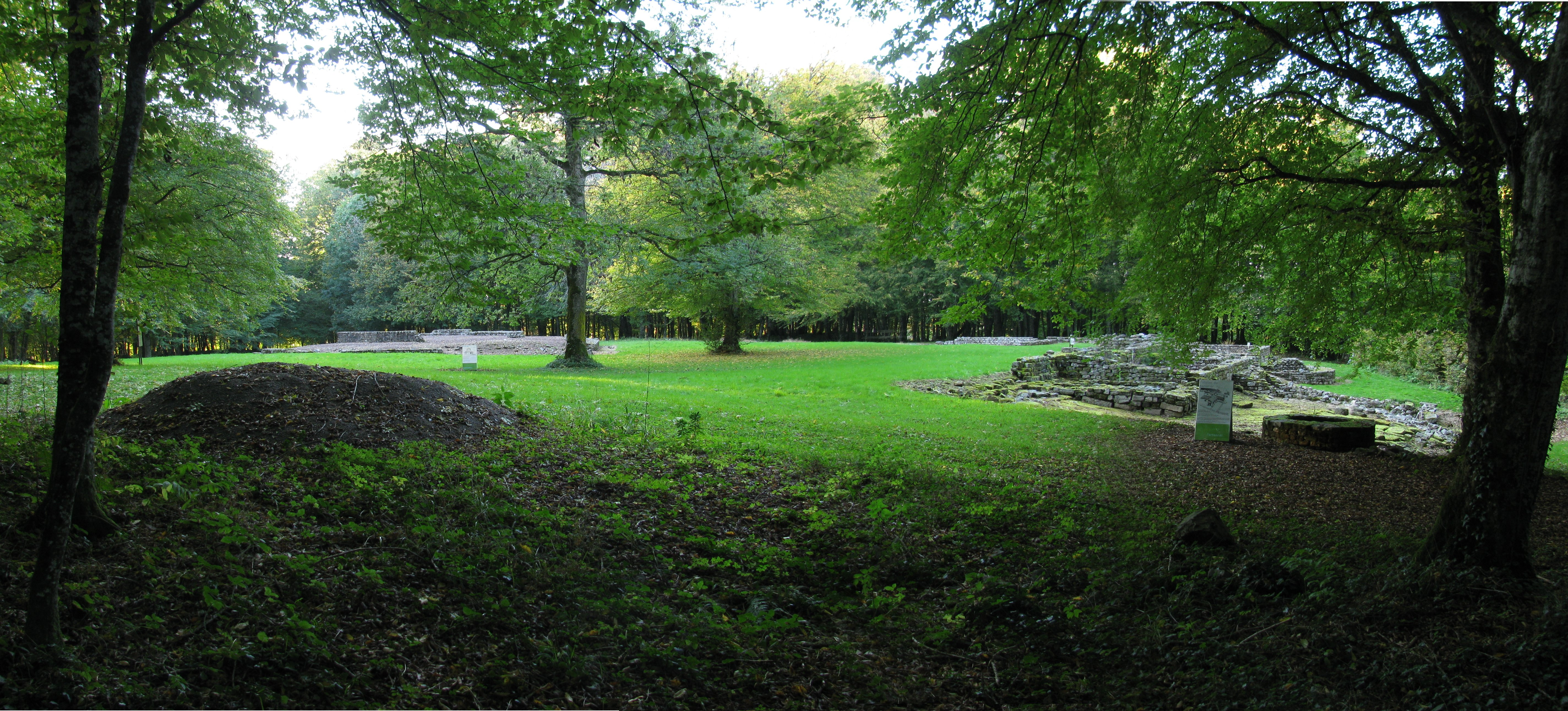 Le forum du vicus gallo-romain de Compierre à Champallement, Nièvre, France.